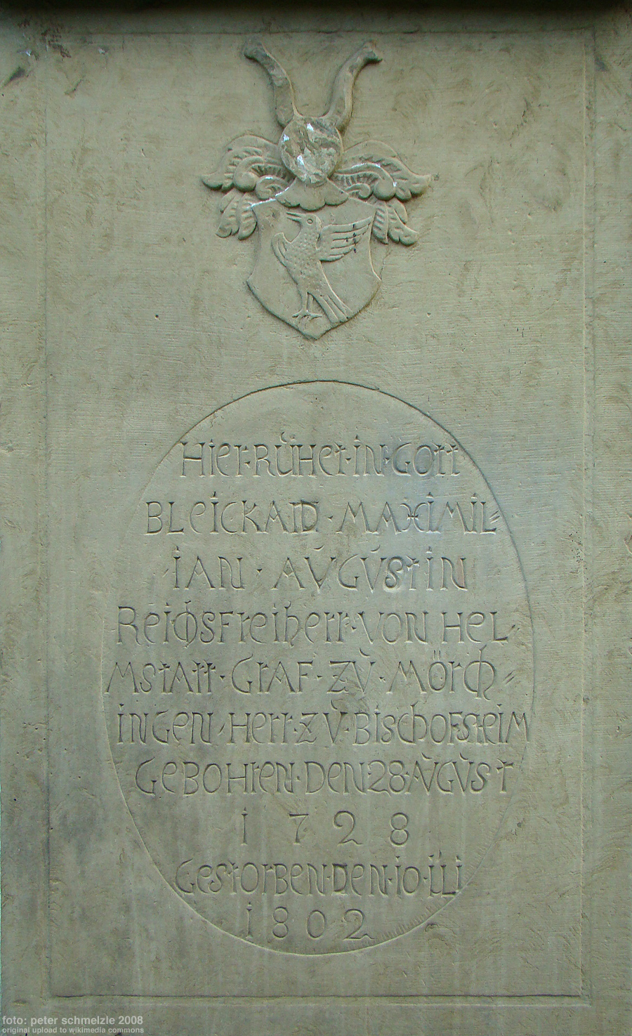 Epitaph für Bleickard Maximilian von Helmstatt (* 28. August 1728; † 1802) an der Totenkirche Neckarbischofsheim